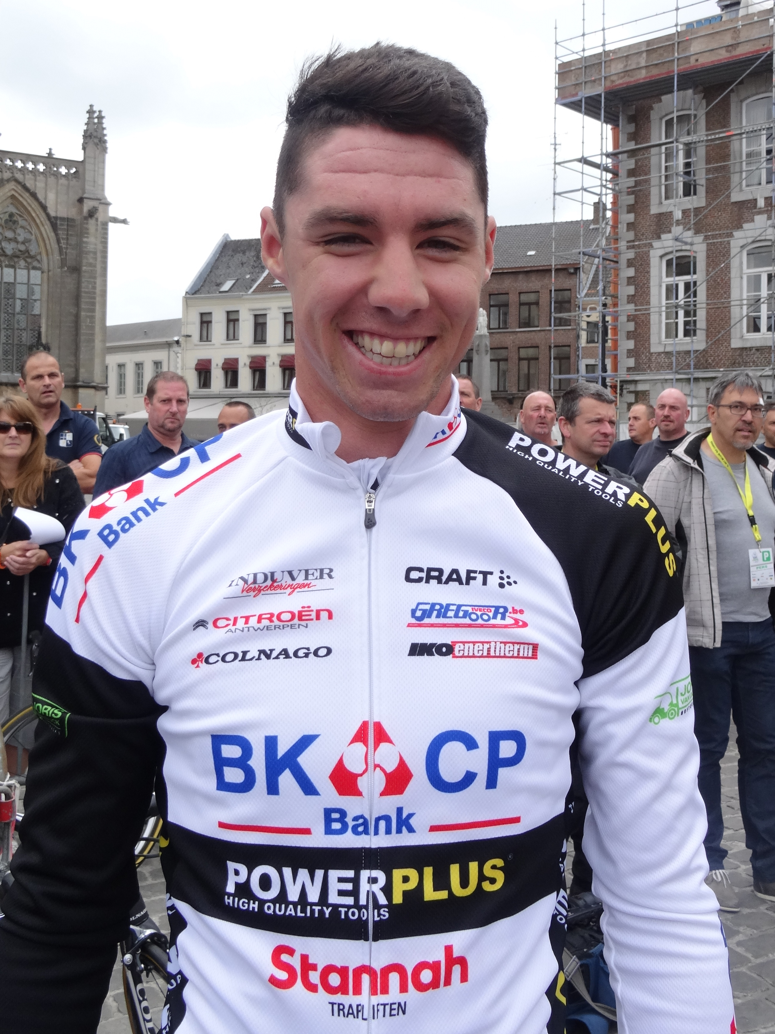 Reportage photographique réalisé le dimanche 15 juin à l'occasion du départ et de l'arrivée du Tour du Limbourg 2014 à Tongres, Belgique.